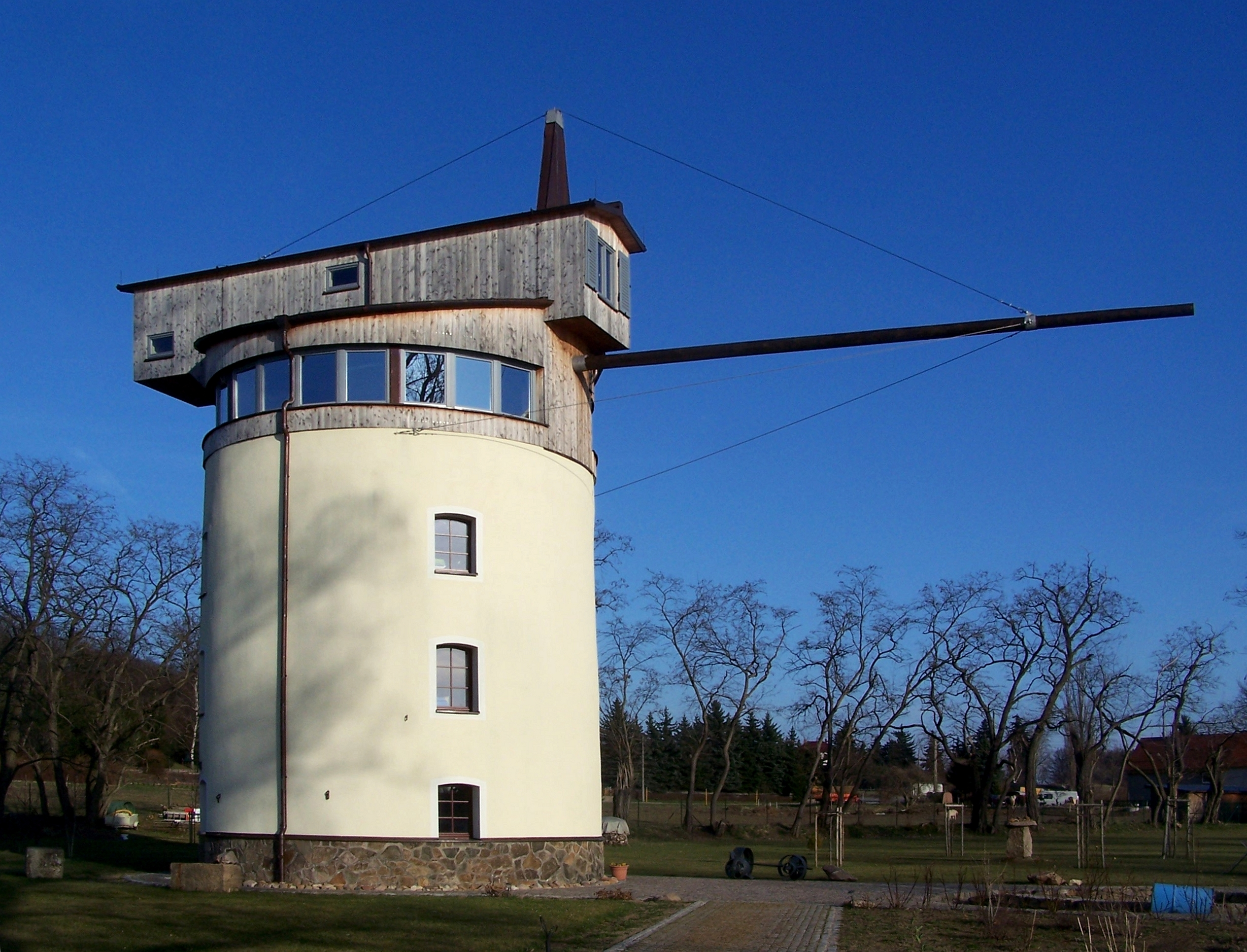 Turmdrehkran Merschwitz, Gemeinde Nünchritz, Landkreis Meißen, siehe turmkran1921-merschwitz.de